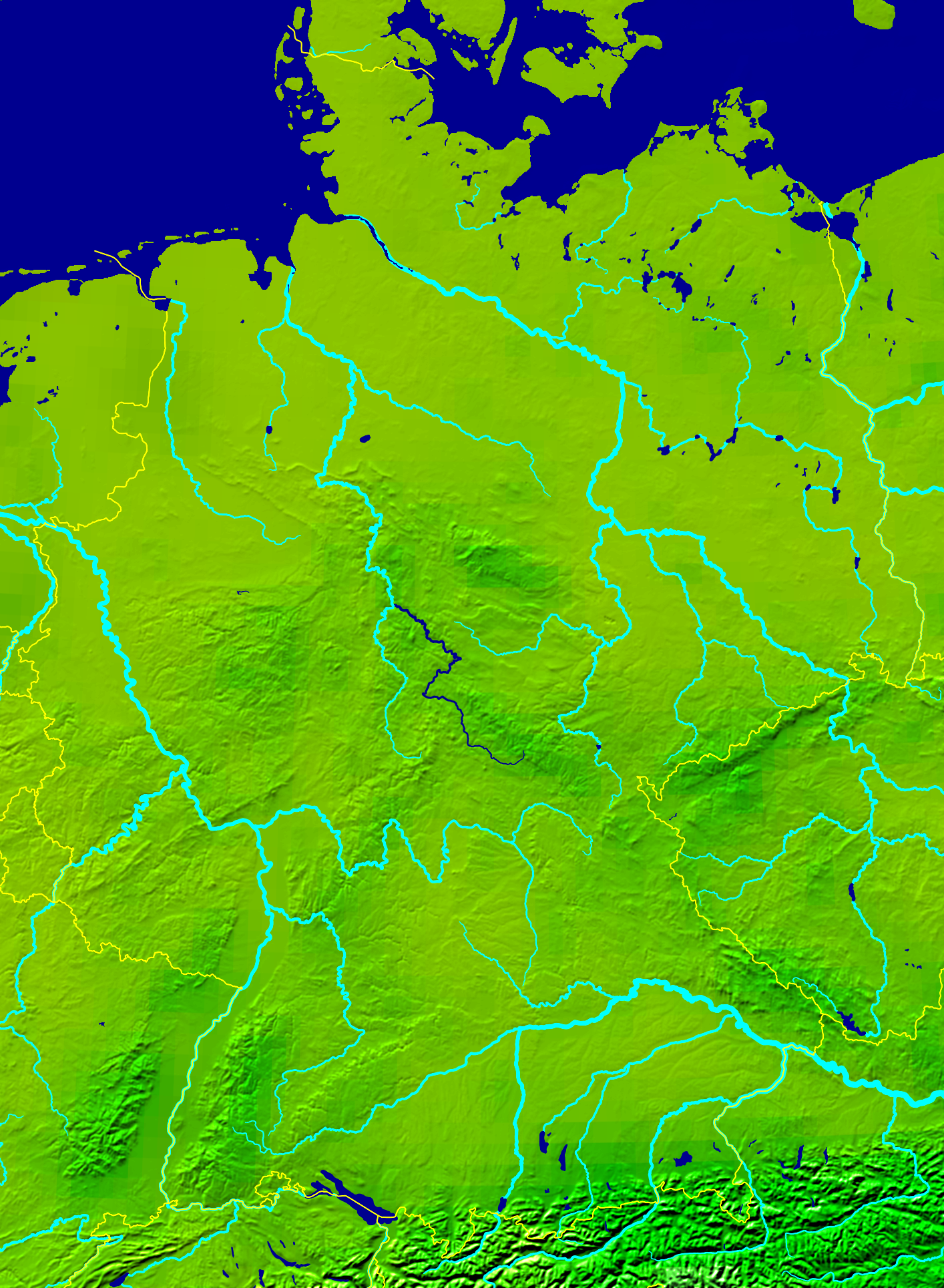 Zu sehen ist die Lage der Werra in Deutschland